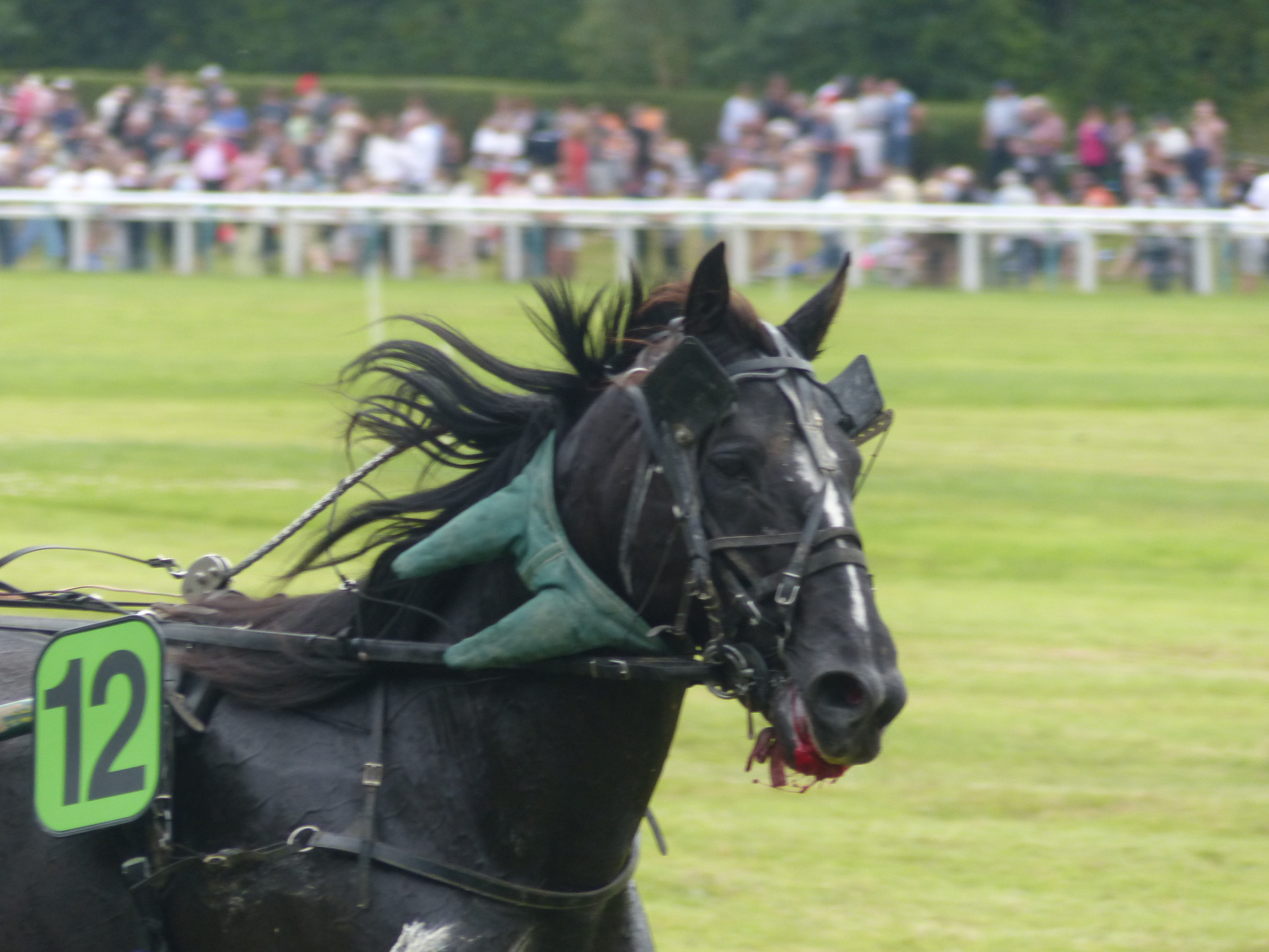 Hémorragie pulmonaire induite par l’exercice chez un cheval trotteur français noir, avec épistaxis bilatérale (saignement des naseaux et de la bouche)